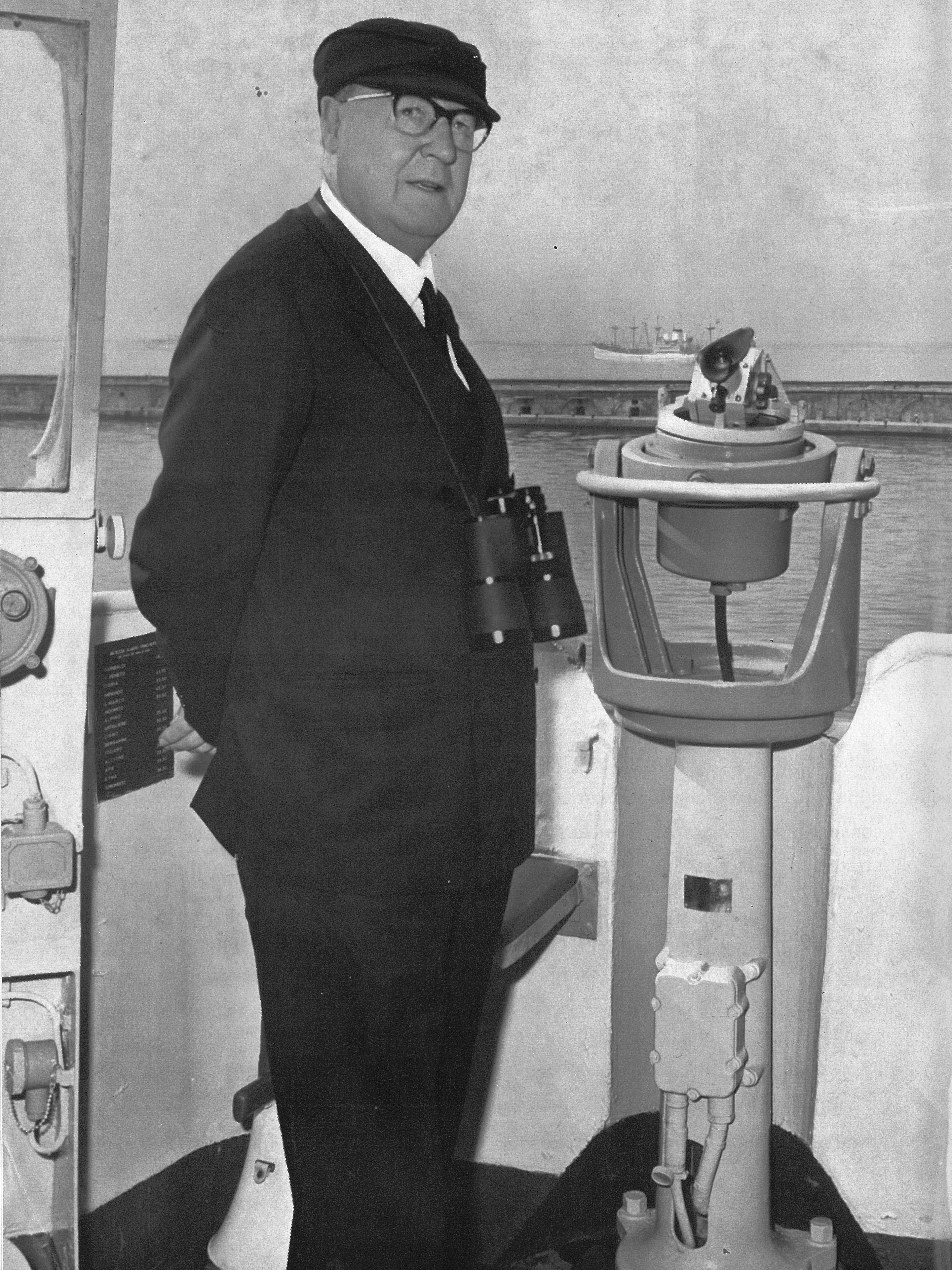 Il Presidente della Repubblica Saragat assiste alla rivista navale nel Golfo di Napoli a bordo dell'incrociatore Garibaldi, ammiraglia della squadra navale